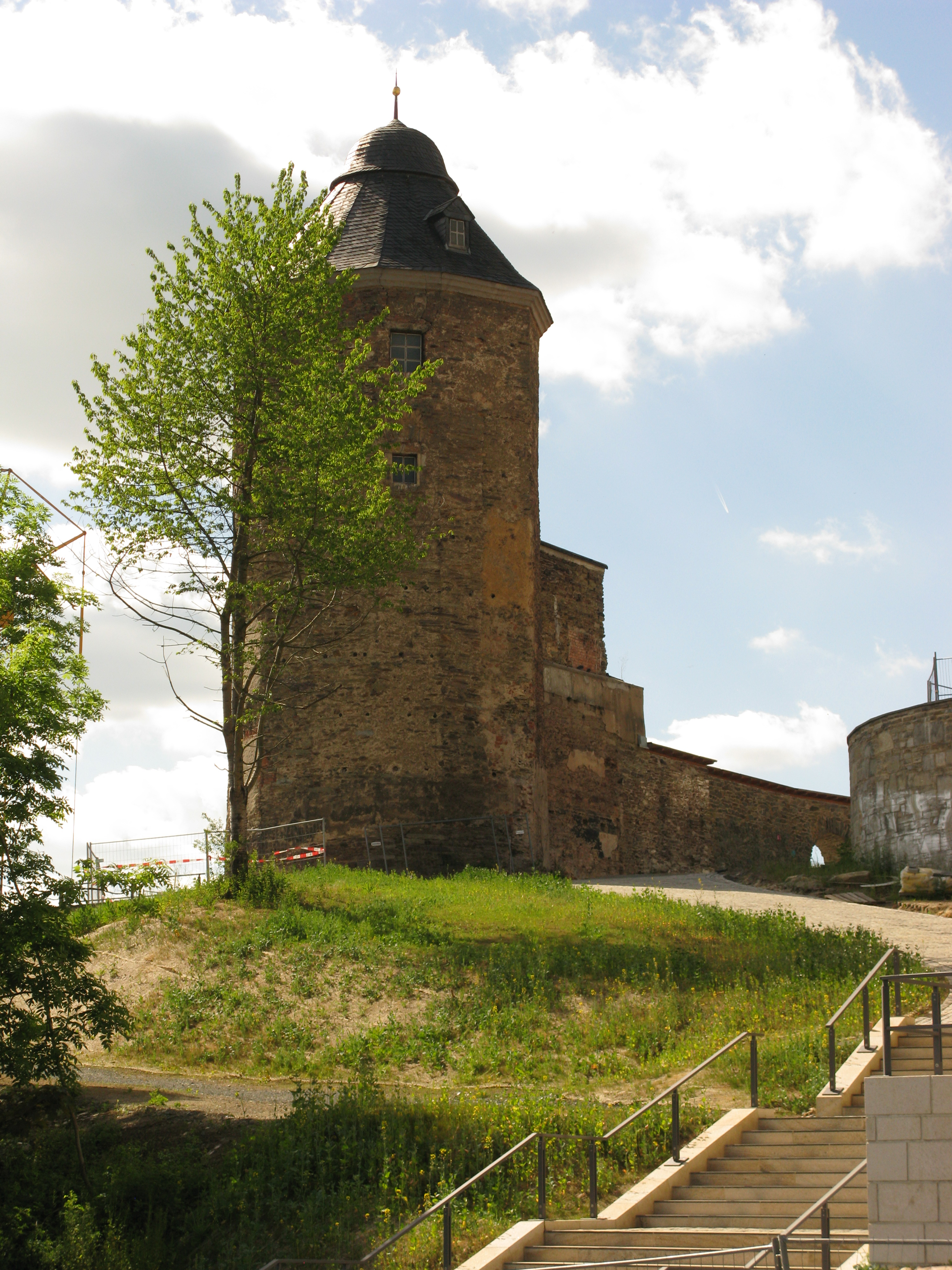 Schloss der Vögte in Plauen - Sechzehneckiger Turm